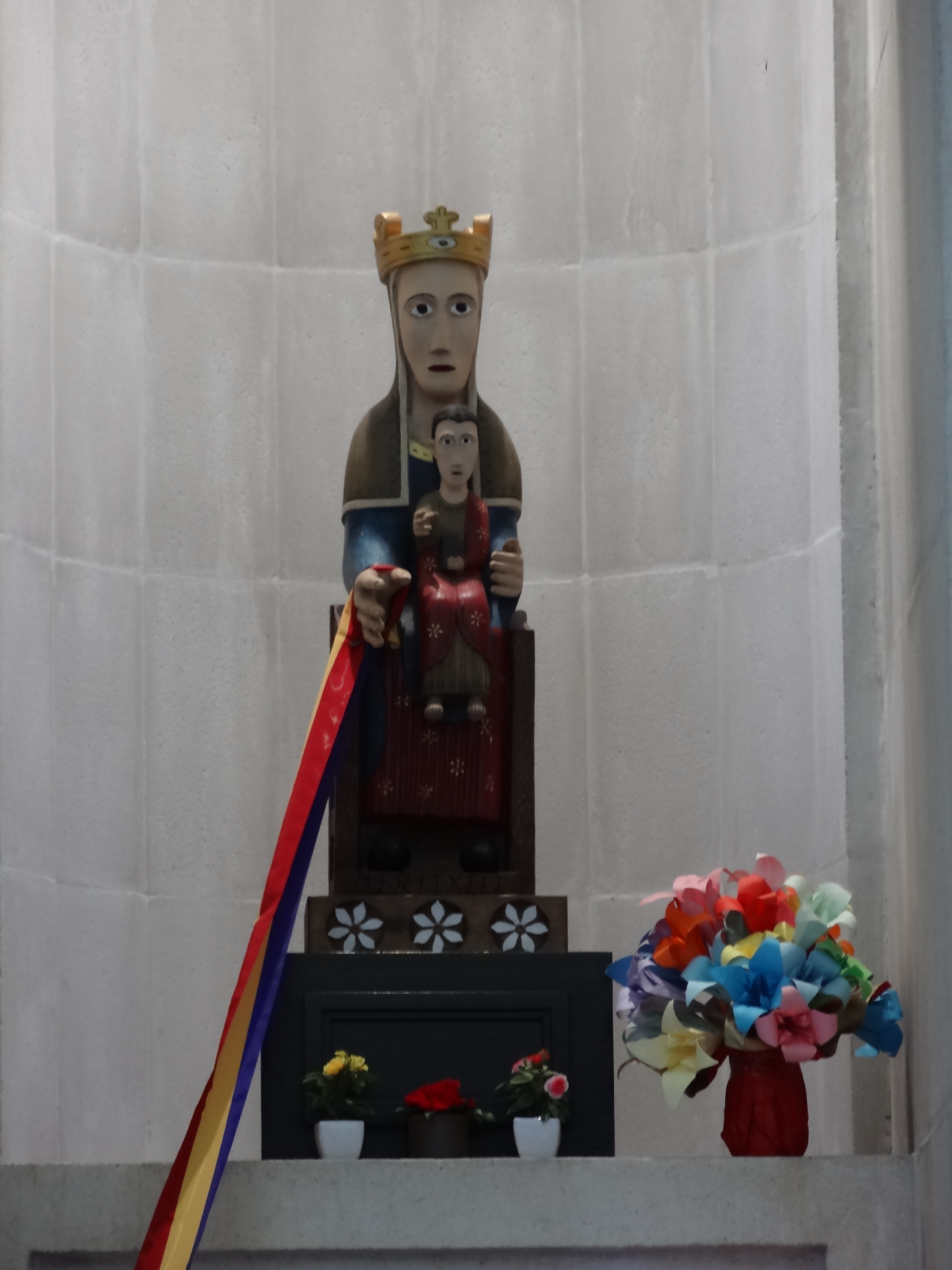 Statue de Mare de Déu à l'intérieur du sanctuaire de Meritxell, Andorre